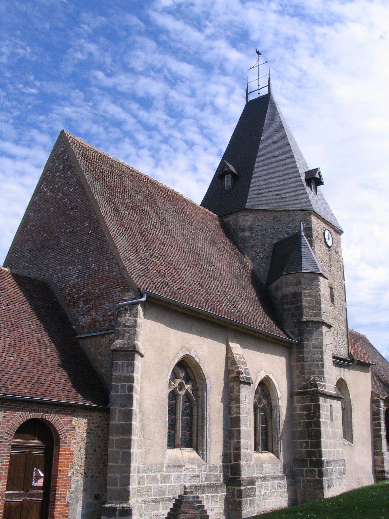 Eglise de la comune d'Aube (Orne,France)